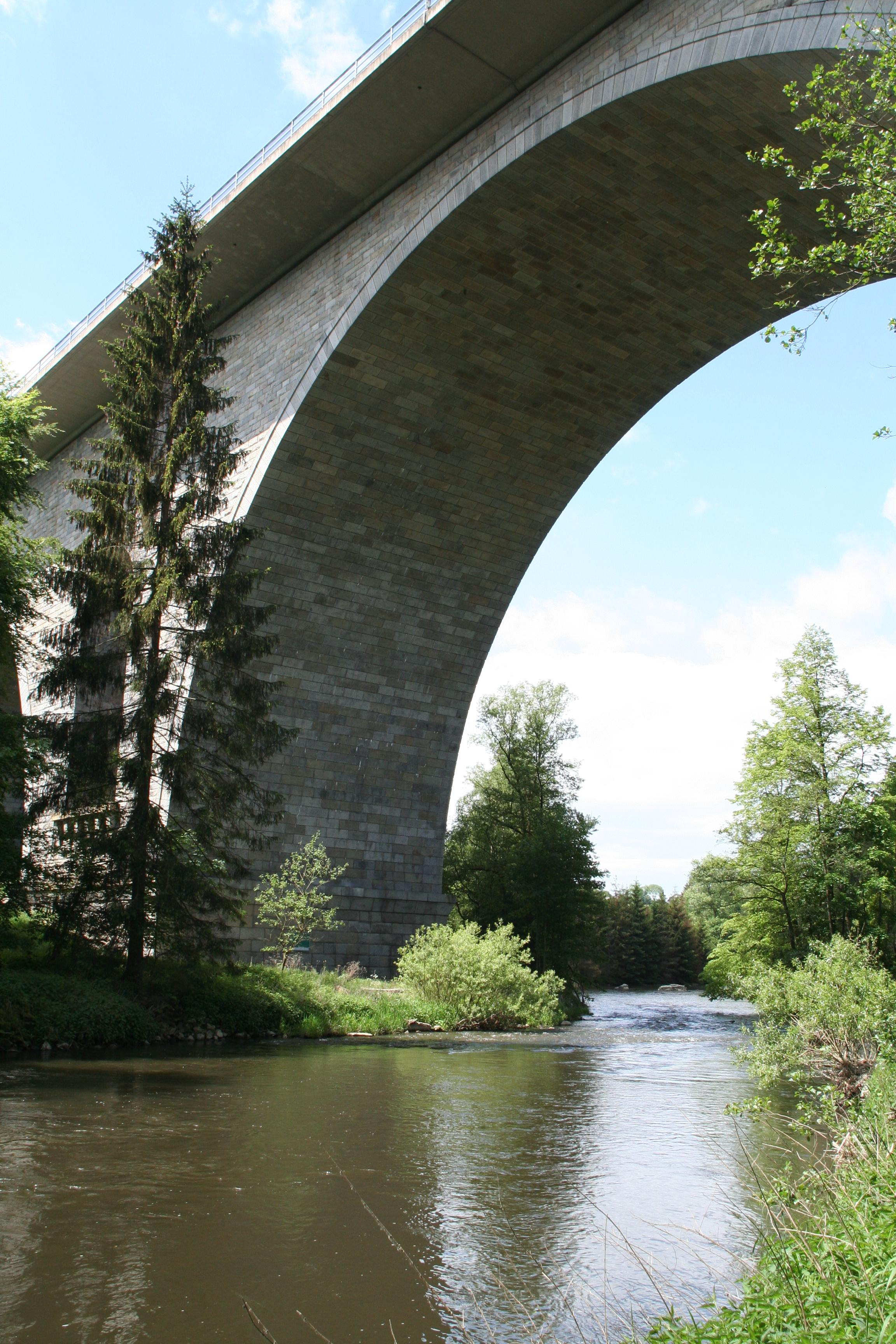 Saalebrücke der A72 bei Saalenstein, OT Köditz in Oberfranken